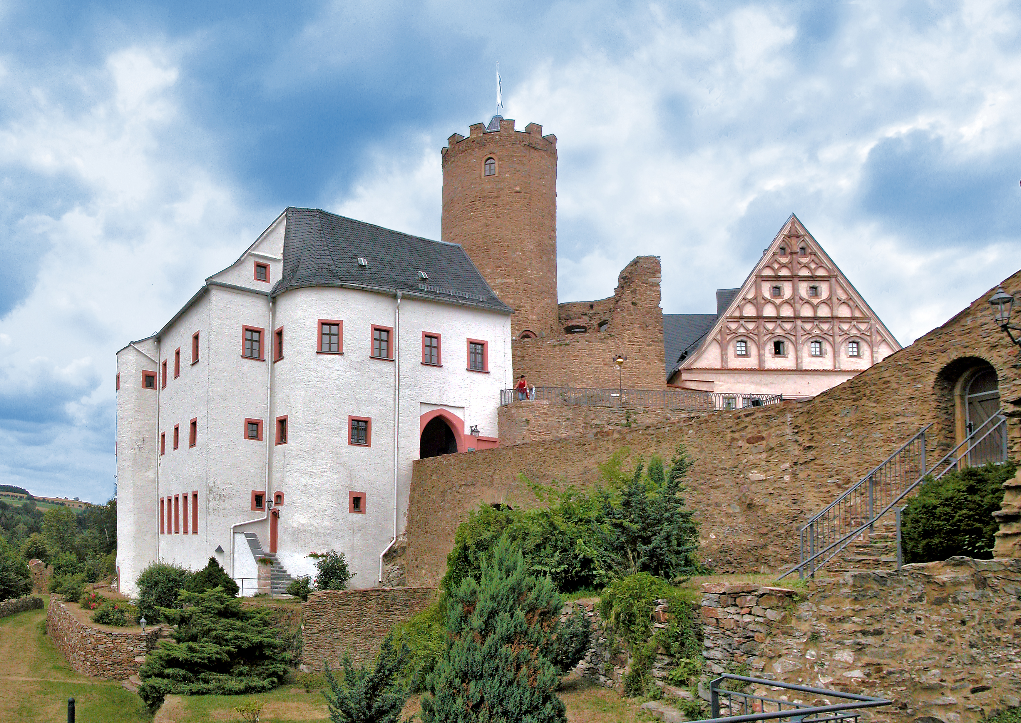 03.08.2006 09430 Scharfenstein (Drebach), Schloßberg 1 (GMP: 50.704770,13.055352): Burg, Ersterwähnung 1349/50. Wiederaufbau von 1921/22 nach Brand. Sicht von Südwesten. [DSCN10873-10874.TIF]20060803340MDR.JPG(c)Blobelt